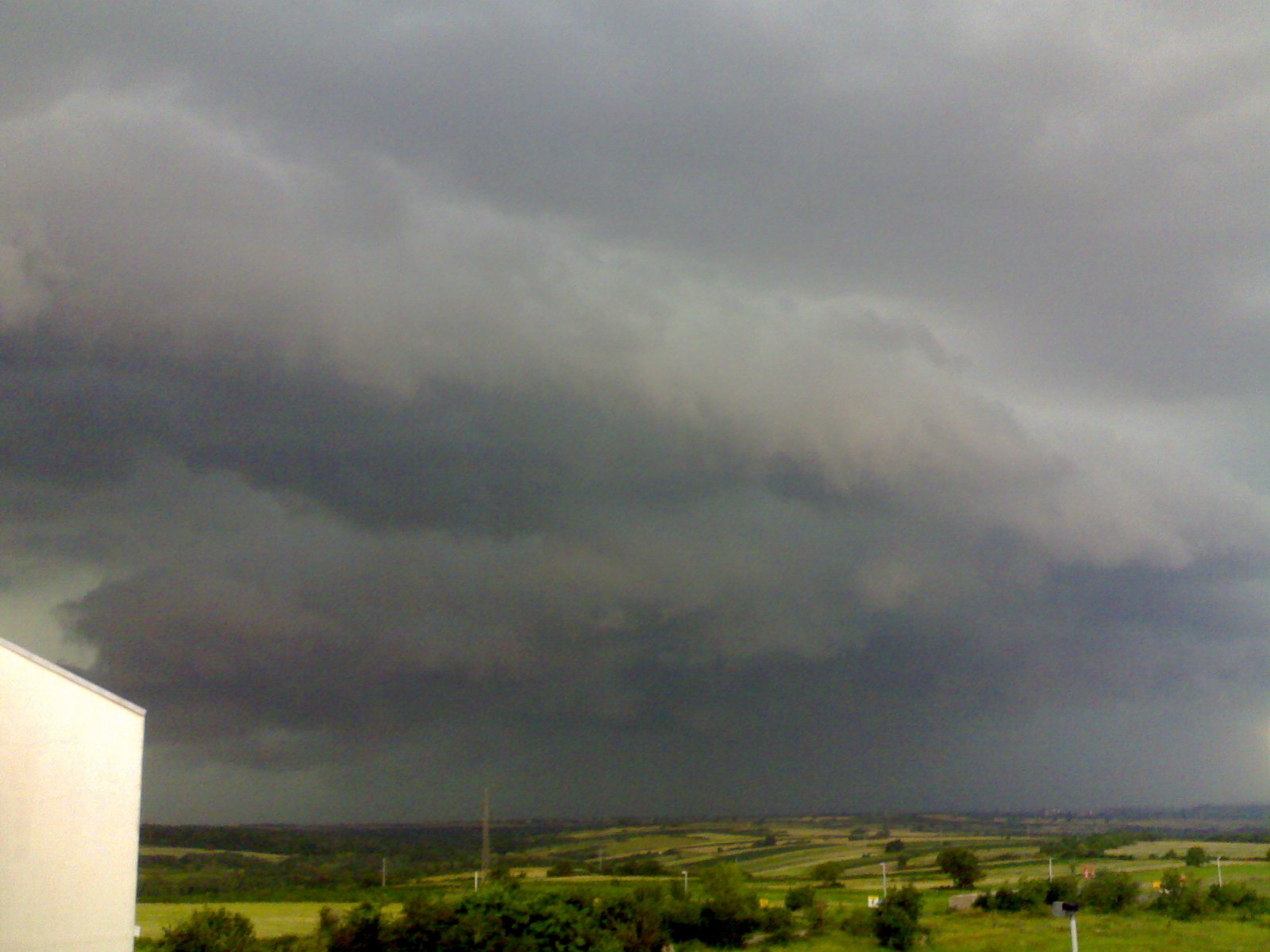 Невреме, сликано 8. 7. 2009. године.